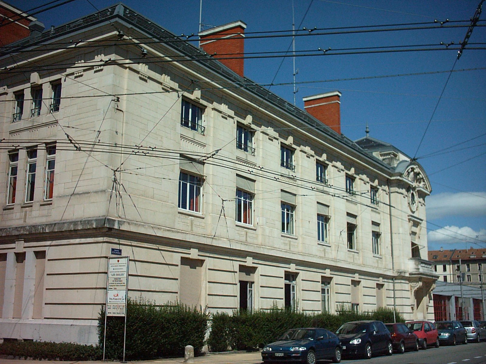 Ancien siège de la Compagnie genevoise des tramways électriques (CGTE) à Genève (Suisse)